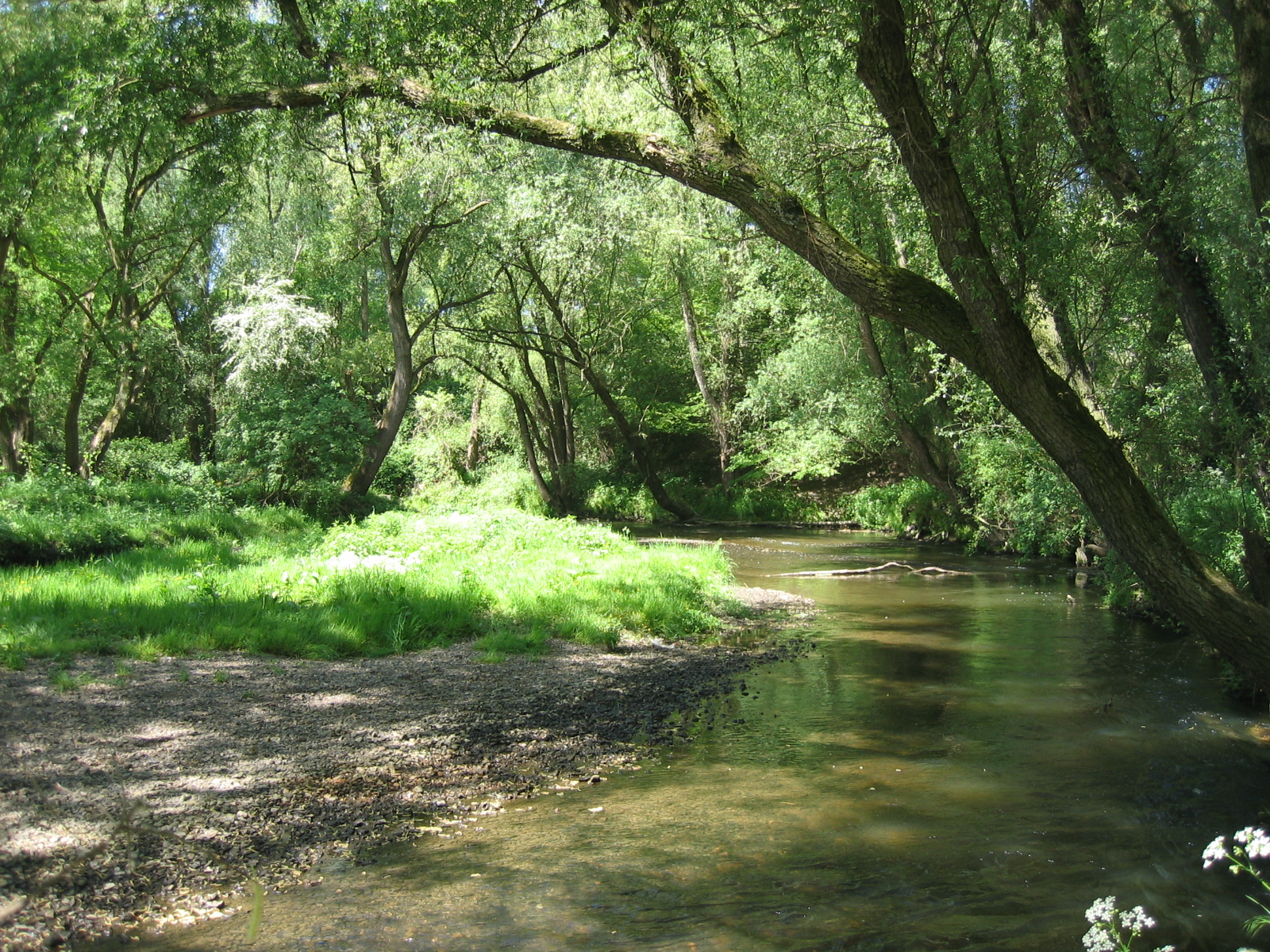 Wurmtal 2007